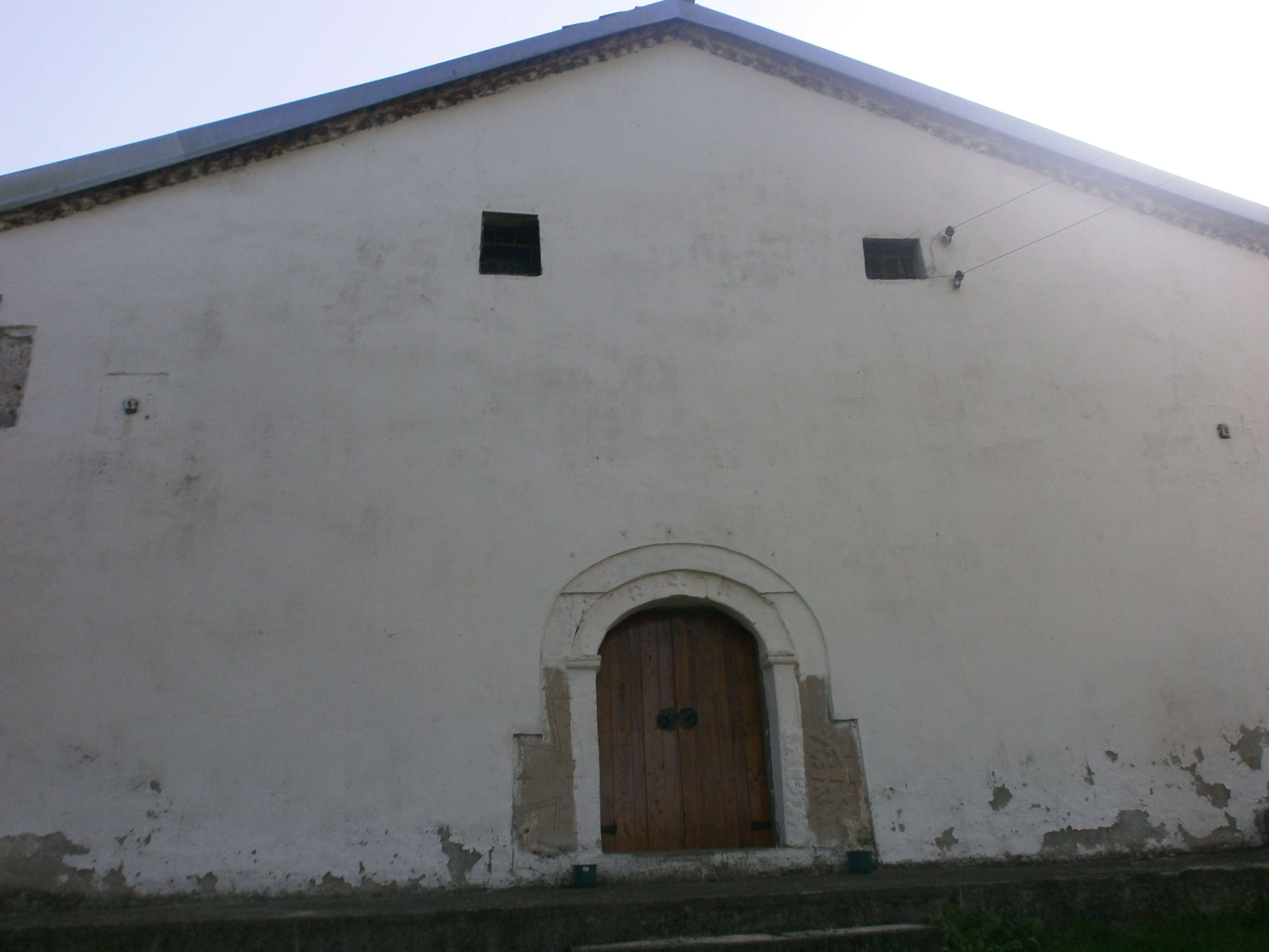 Srpski (latinica): Rudare, Leskovac